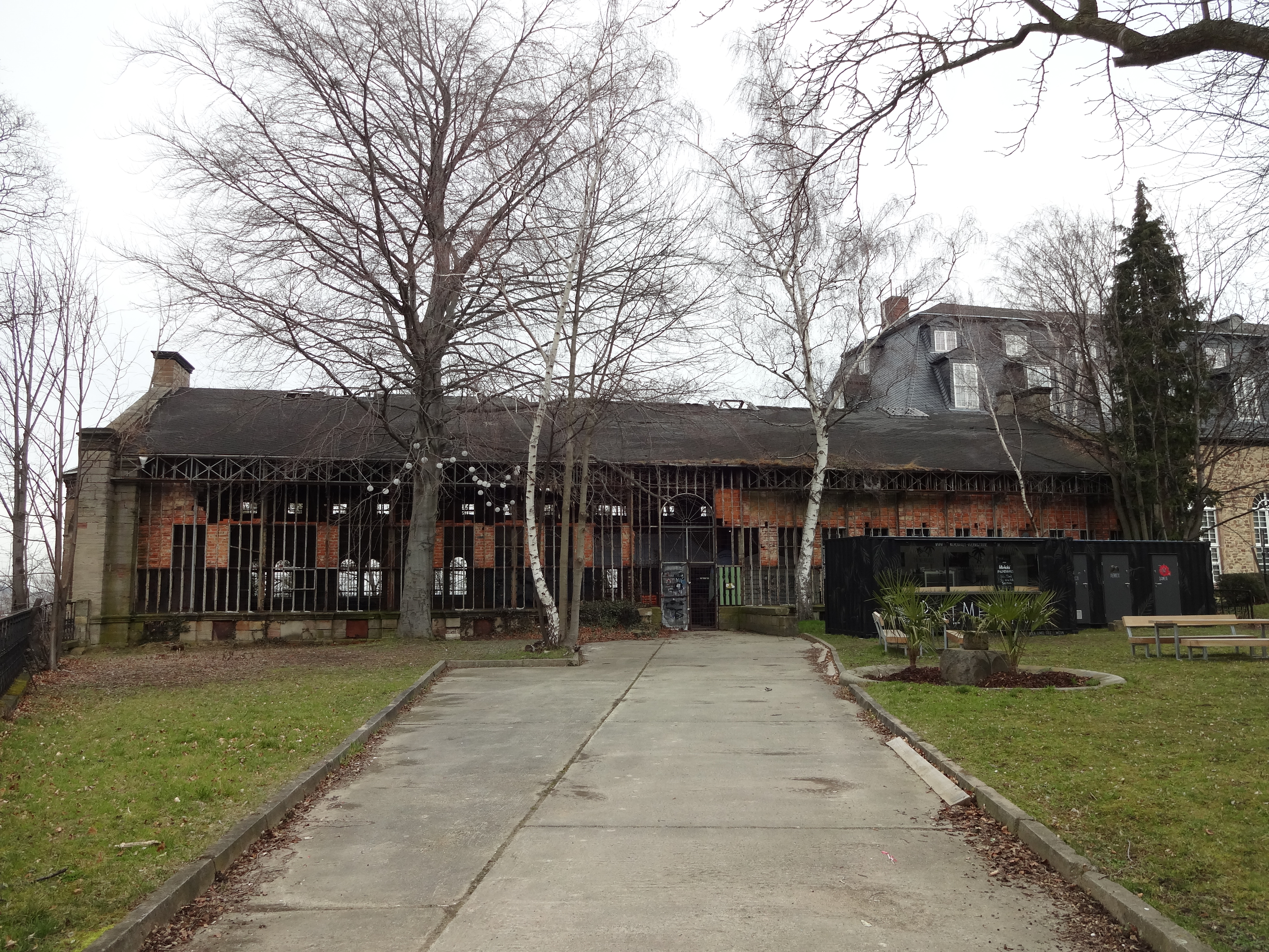 denkmalgeschütztes Palmenhaus in der Lindenallee in Wernigerode